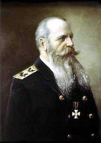 Stepan Osipovich Makarov (Степан Осипович Макаров), Russian Admiral (b.1849-d.1904)